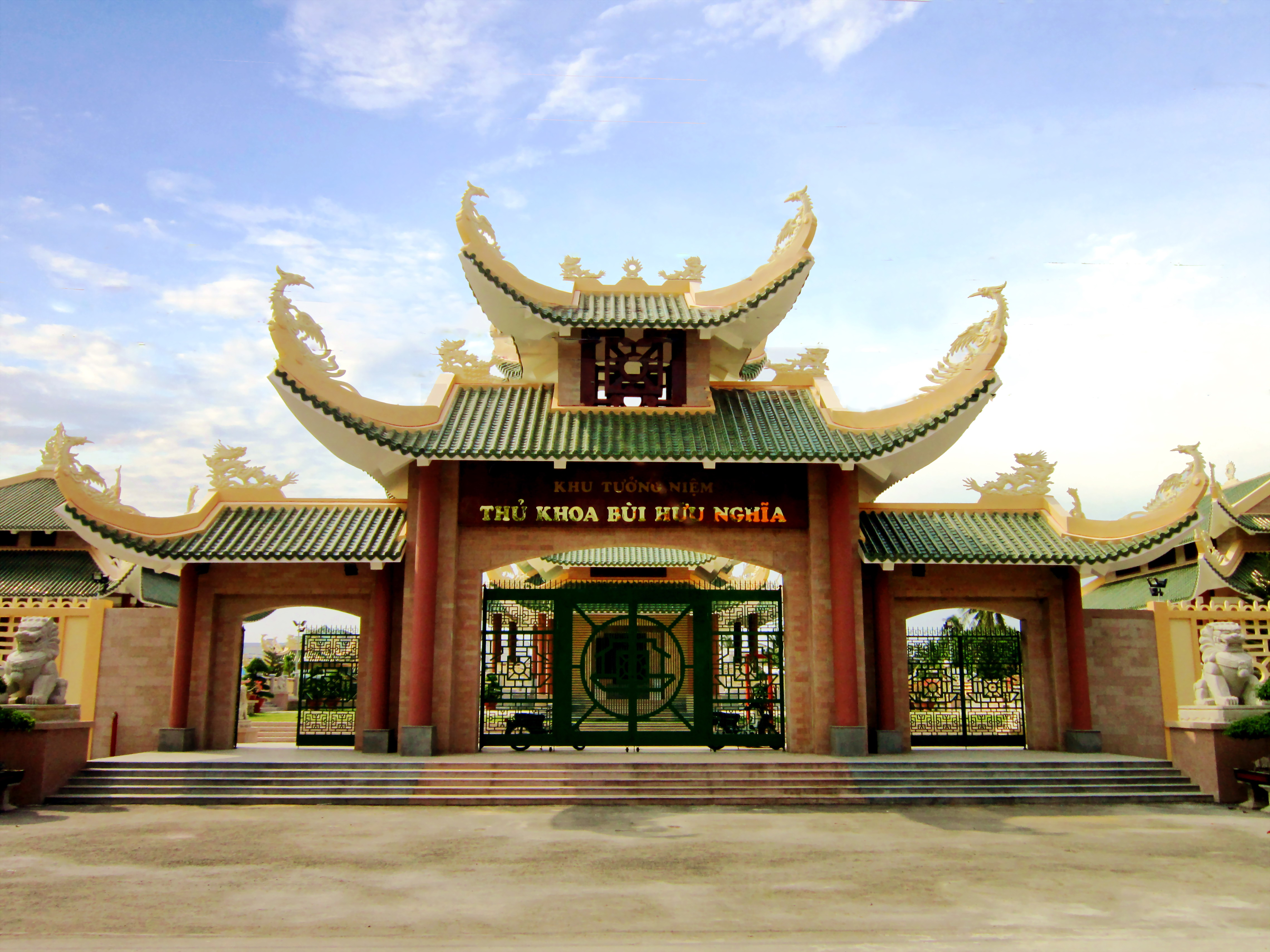 Khu tưởng niệm nhà thơ Bùi Hữu Nghĩa (1807 - 1872), nằm trên đường Huỳnh Mẫn Đạt; thuộc phường Bùi Hữu Nghĩa, quận Bình Thủy, thành phố Cần Thơ, Việt Nam.